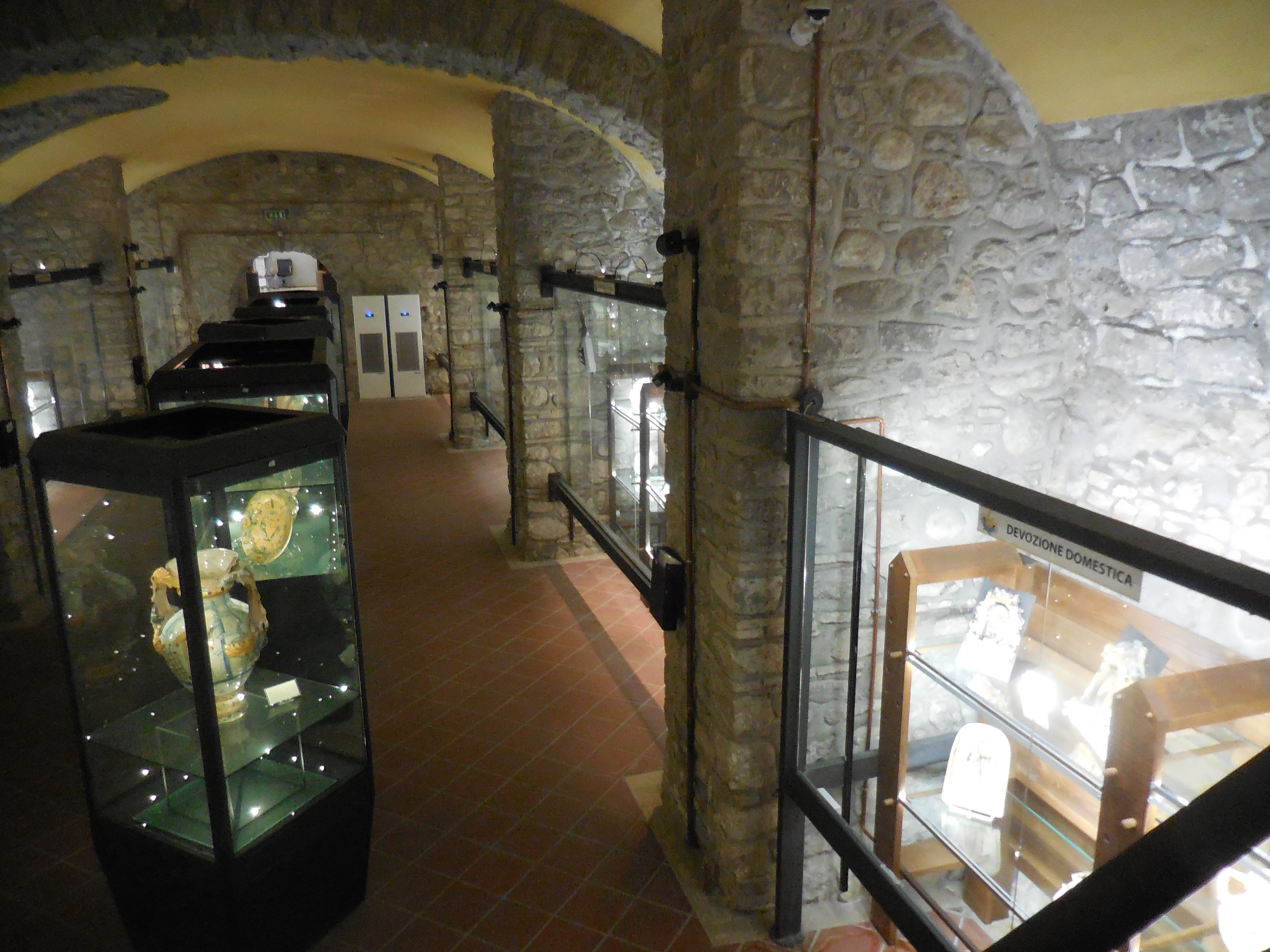 Scorcio del salone del cantinone all'interno del museo civico della ceramica cerretese, Cerreto Sannita (Benevento).